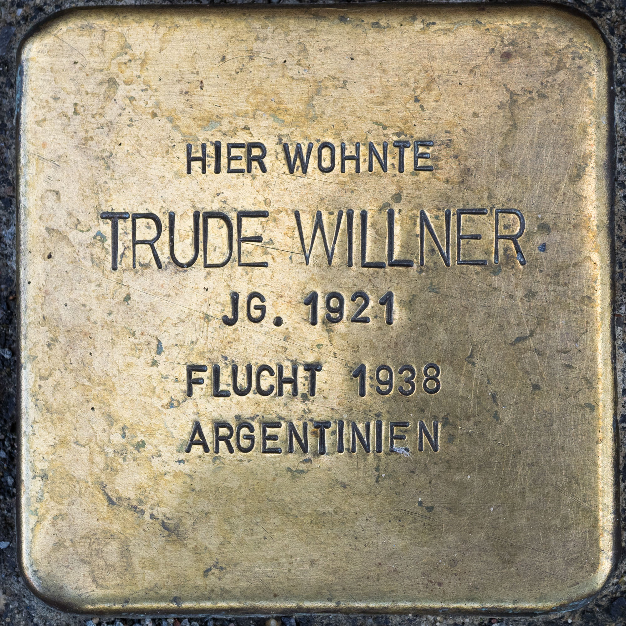 2016 Stolpersteine ToeVo Willner Trude